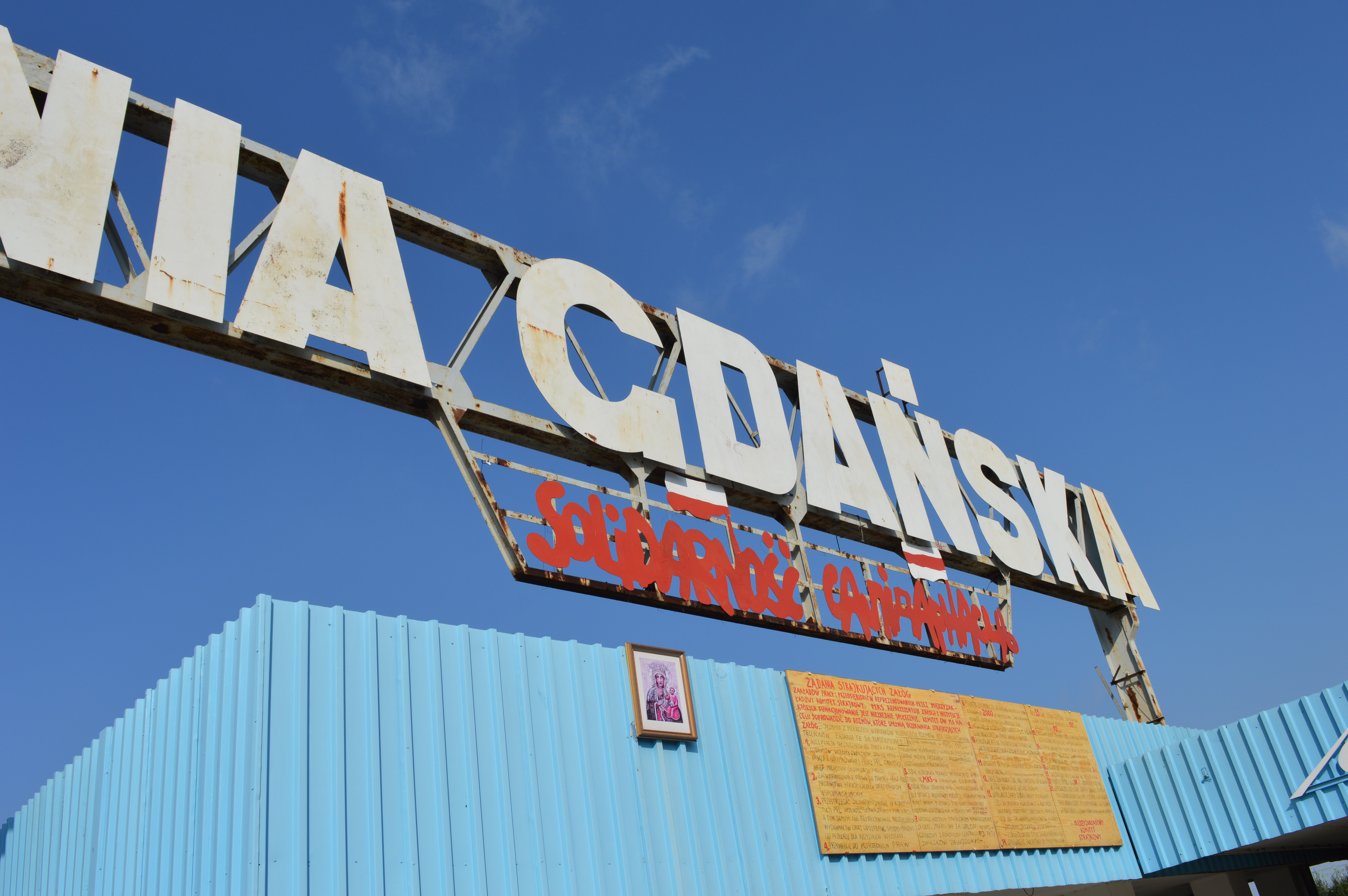 Brama nr 2 Stoczni Gdańskiej 10.08.2020